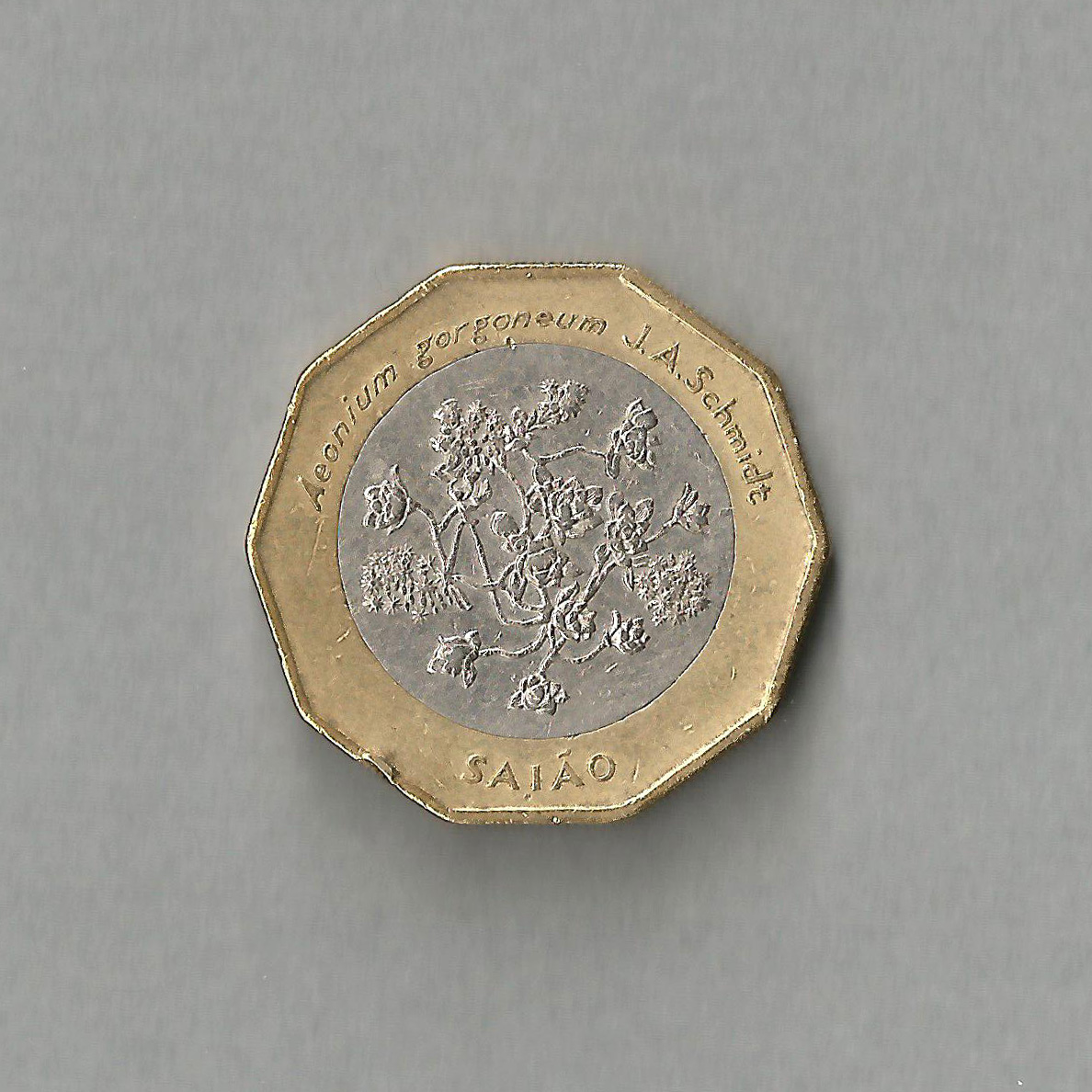 Pièce de 100 escudos du Cap-Vert, émise en 1994. Représente Aeonium gorgoneum, plante endémique du Cap-Vert.